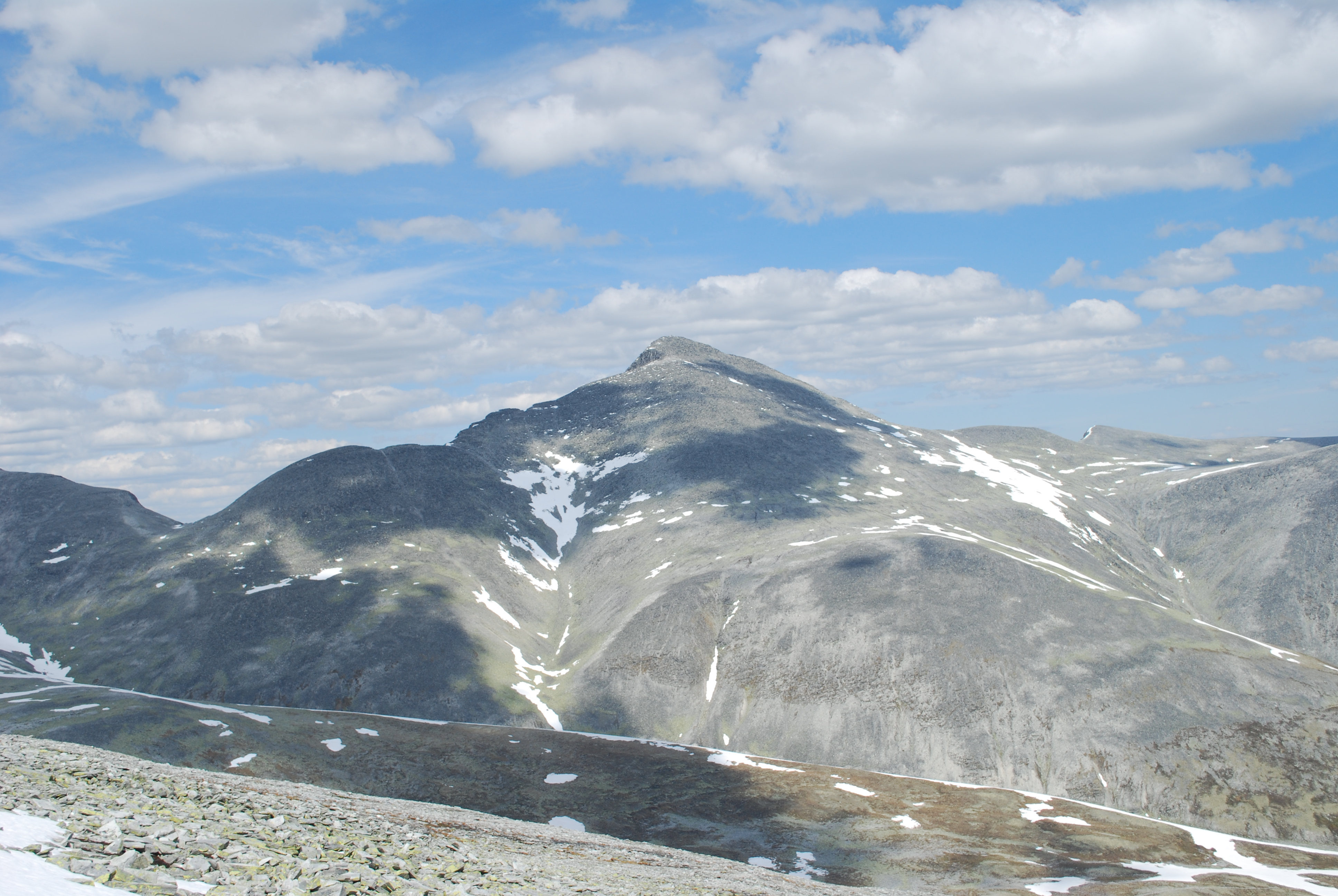 Høgronden sett fra vest mot øst ved stien i fjellsiden opp mot Rondslottet.